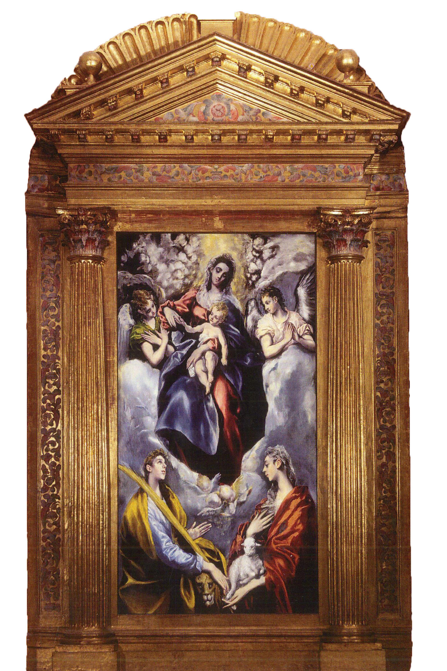 Reconstrucción de este Retablo con el lienzo de la Virgen, el Niño y dos Santas.